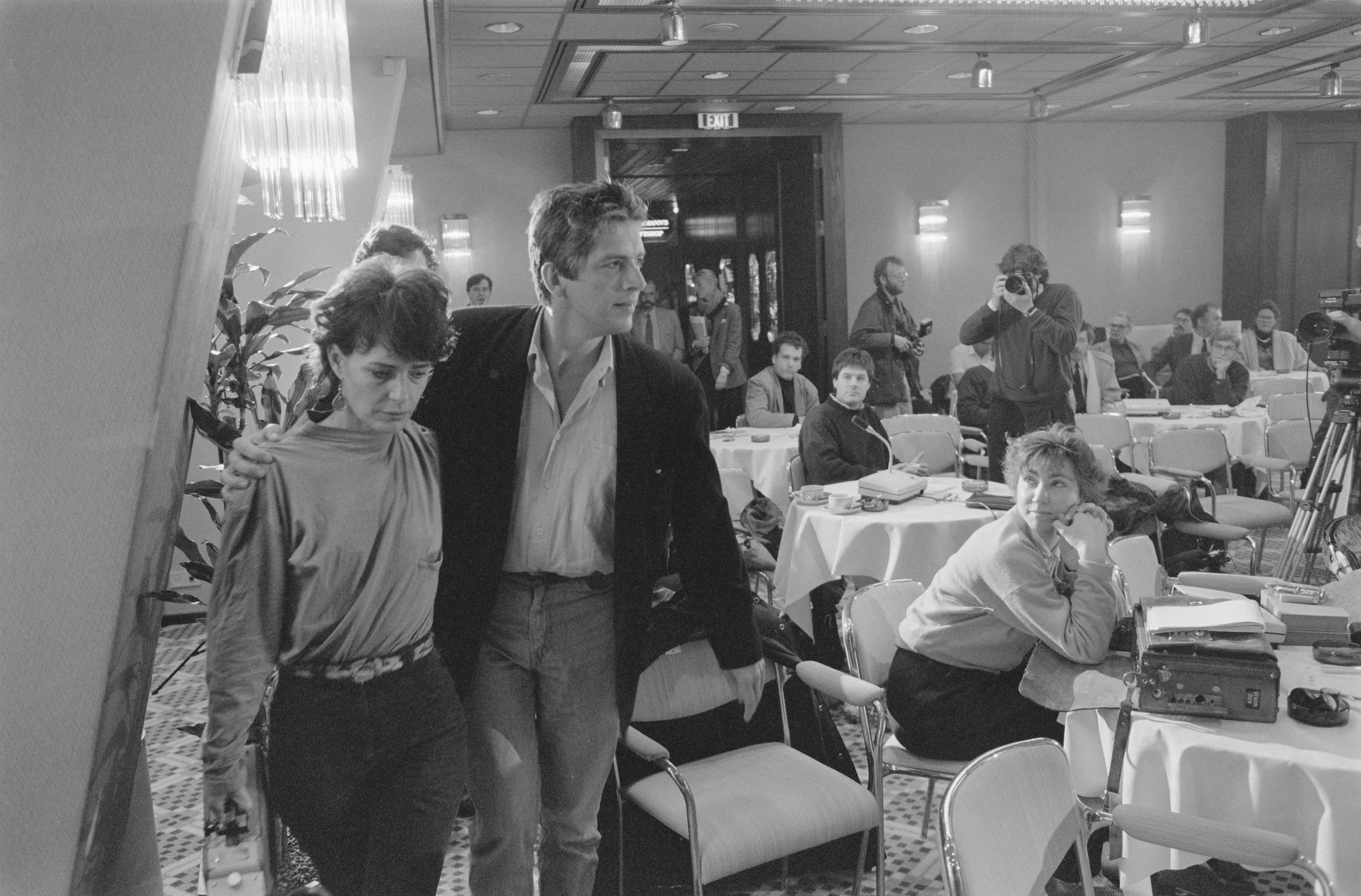 Collectie / Archief : Fotocollectie Anefo Reportage / Serie : Aankomst op Schiphol (vanuit El Salvador) van journalist Cees Elenbaas en geluidsvrouw Annelies Helwegen met het stoffelijk overschot van camaraman Cornel Lagrouw. Helwegen draagt de camera van haar doodgeschoten vriend Lagrouw. Beschrijving : aankomsten, journalisten, geluidsvrouwen, Elenbaas, C., Helwegen, A., Lagrouw, C. Datum : 24 maart 1989 Locatie : Noord-Holland, Schiphol Trefwoorden : aankomsten, geluidsvrouwen, journalisten Persoonsnaam : Elenbaas, C., Helwegen, A., Lagrouw, C. Fotograaf : Croes, Rob C. / Anefo Auteursrechthebbende : Nationaal Archief Materiaalsoort : Negatief (zwart/wit) Nummer archiefinventaris : bekijk toegang 2.24.01.05 Bestanddeelnummer : 934-4278